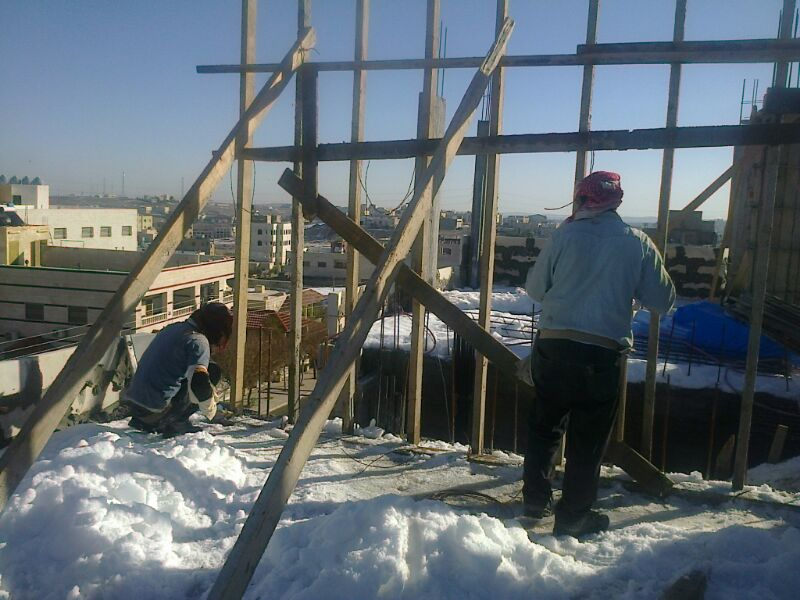 طوبار 4